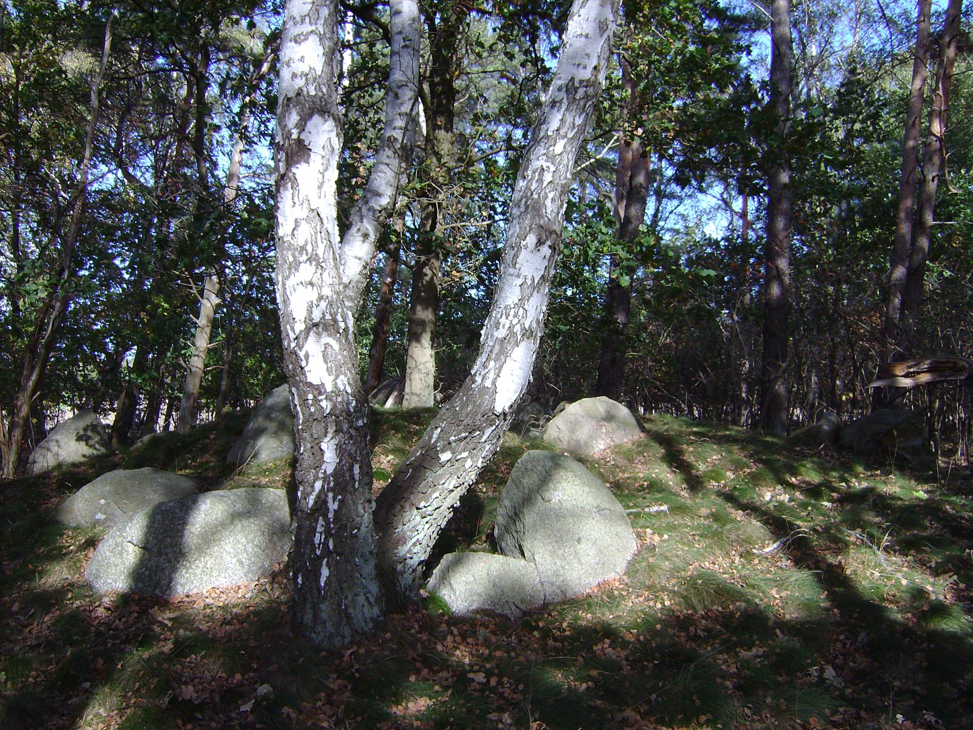 Großsteingrab Gohlau 2